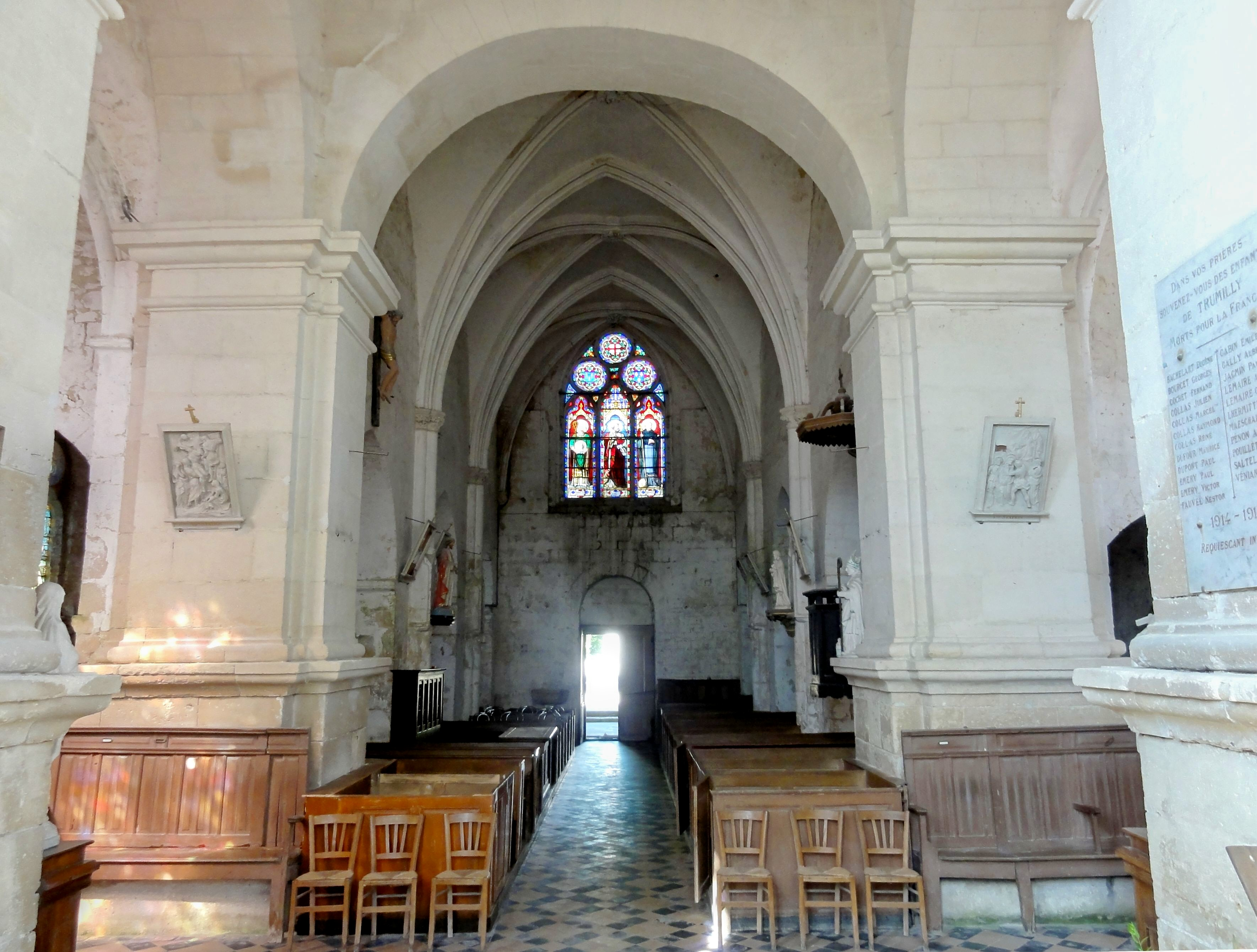 Abside, vue vers l'ouest.